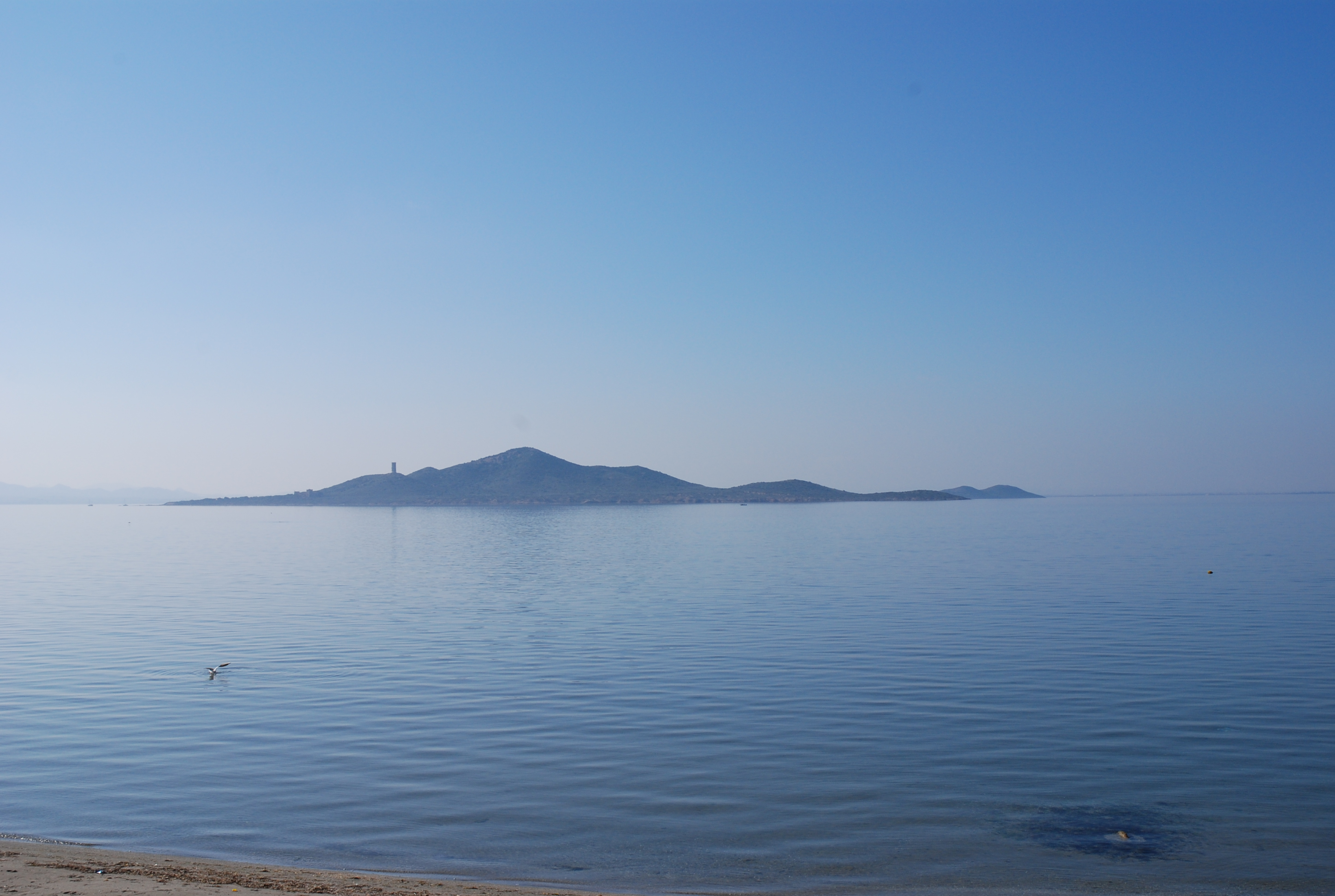 Isla del Barón (Mar Menor)